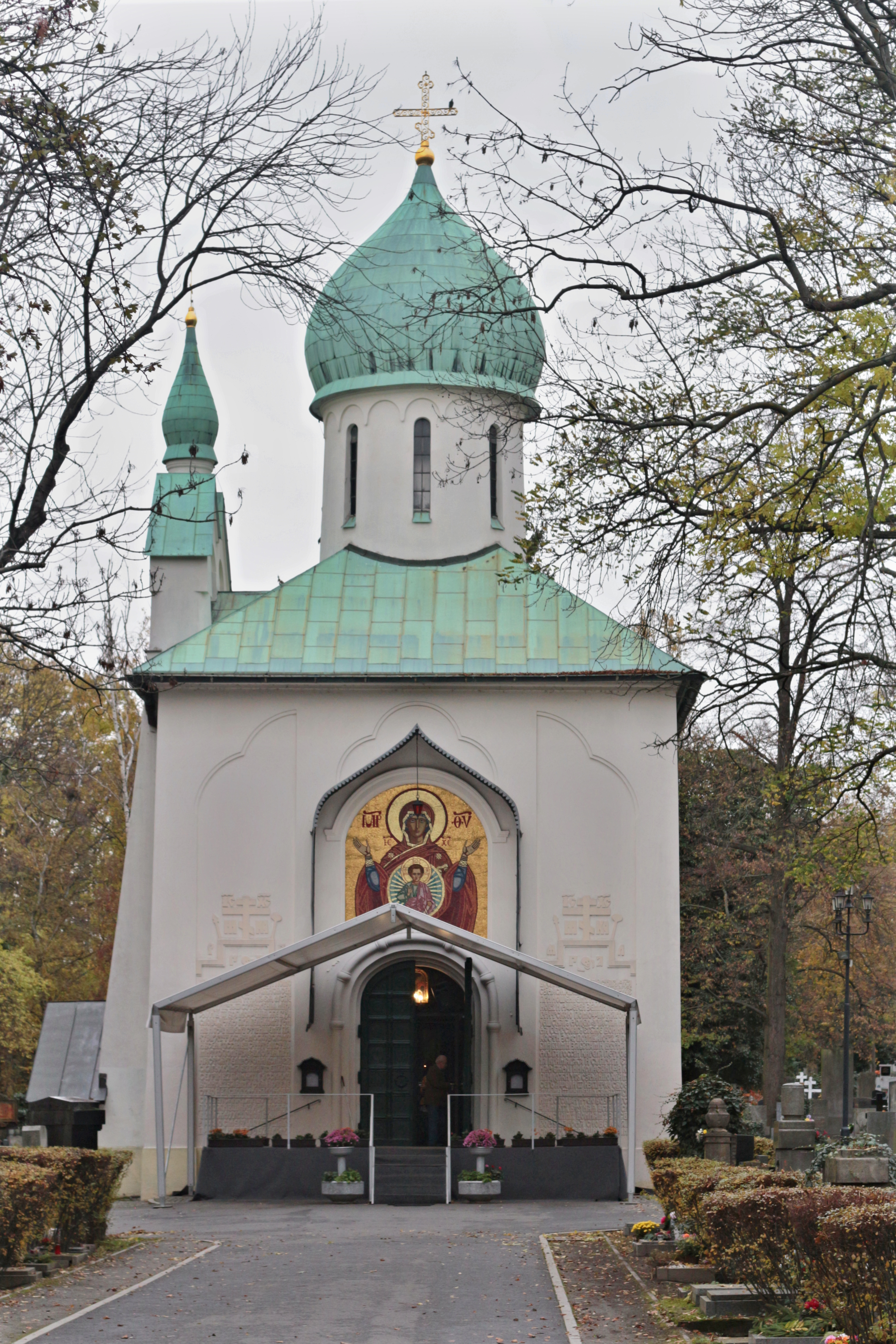 Pravoslavný chrám Zesnutí Přesvaté Bohorodice na Olšanském hřbitově